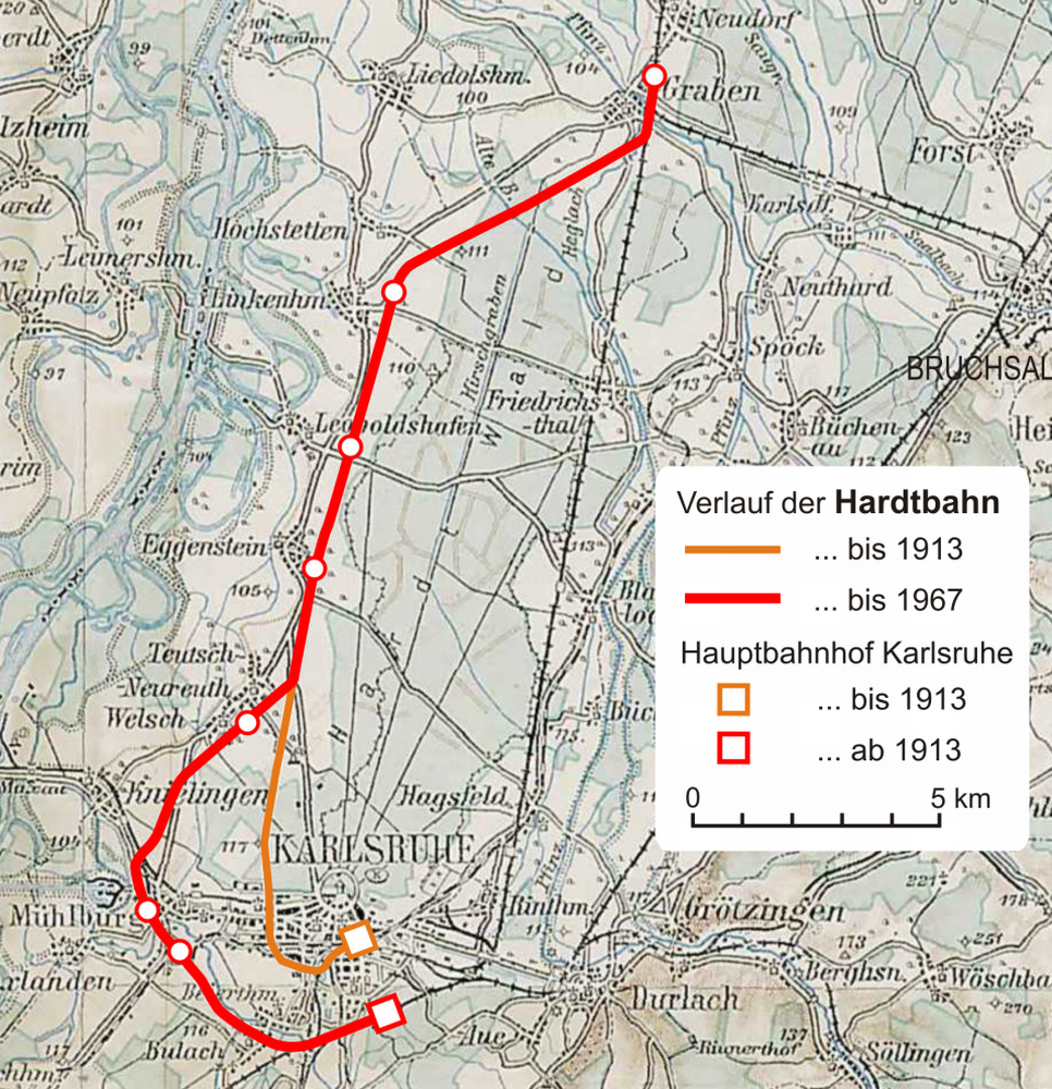 Verlauf der Hardtbahn bis 1967